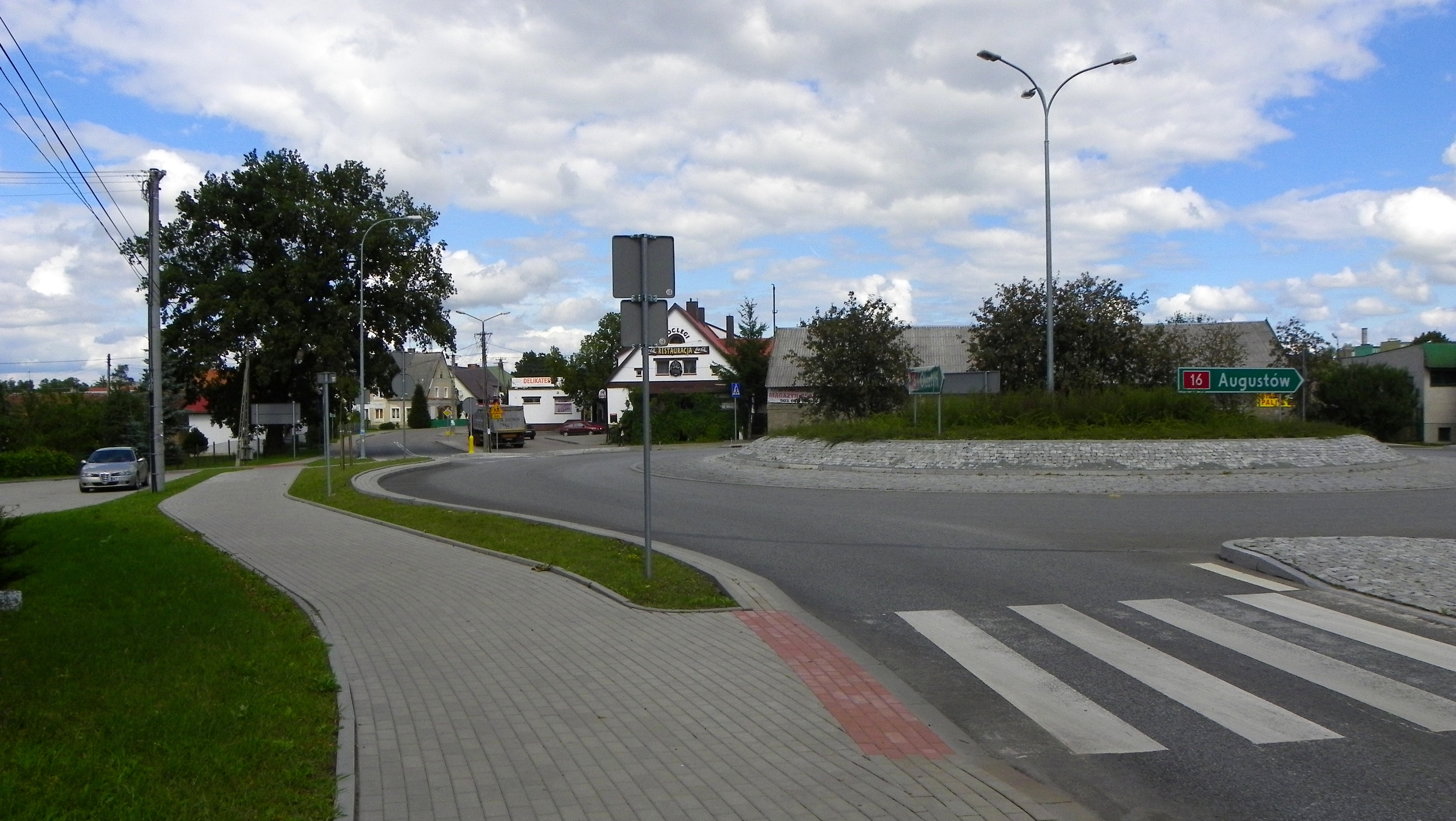 Rondo w Kalinowie (powiat ełcki), w okolicy kościoła p.w. Wniebowzięcia NMP.